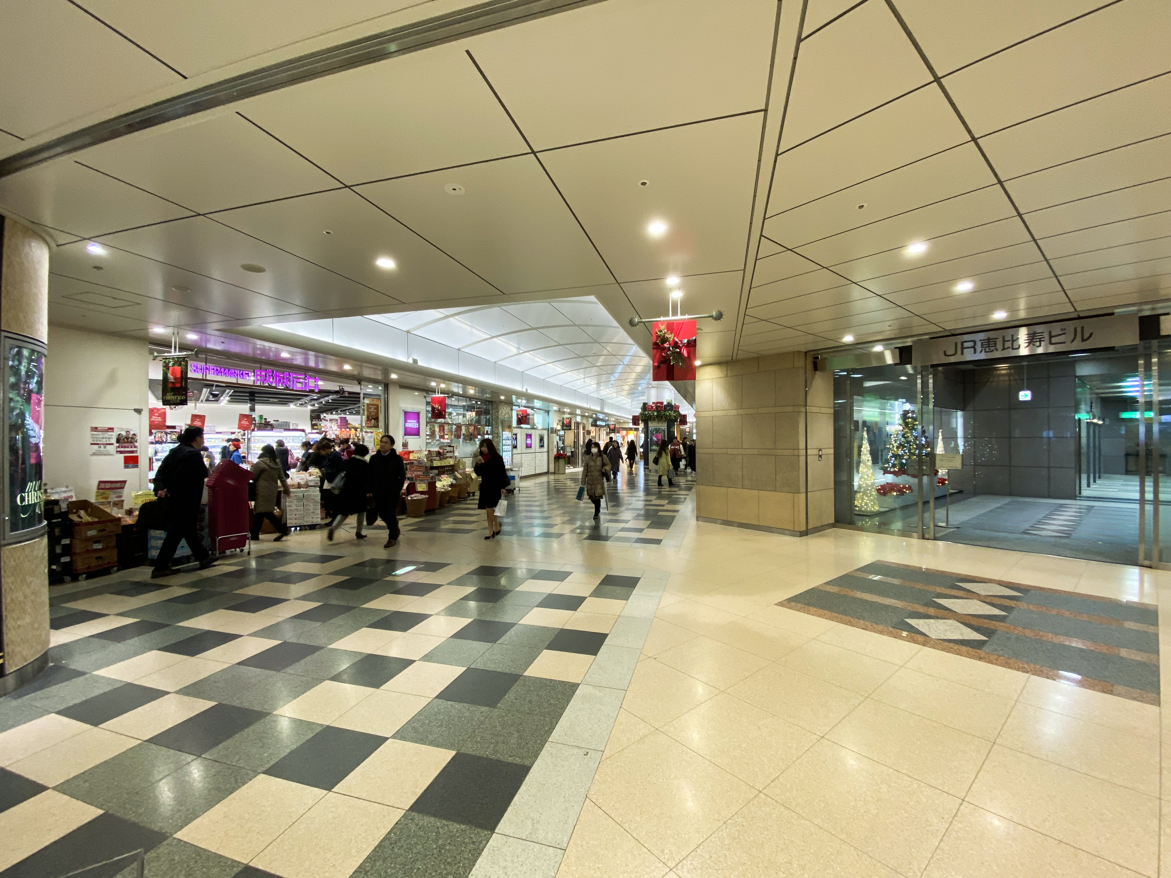 atre ebisu